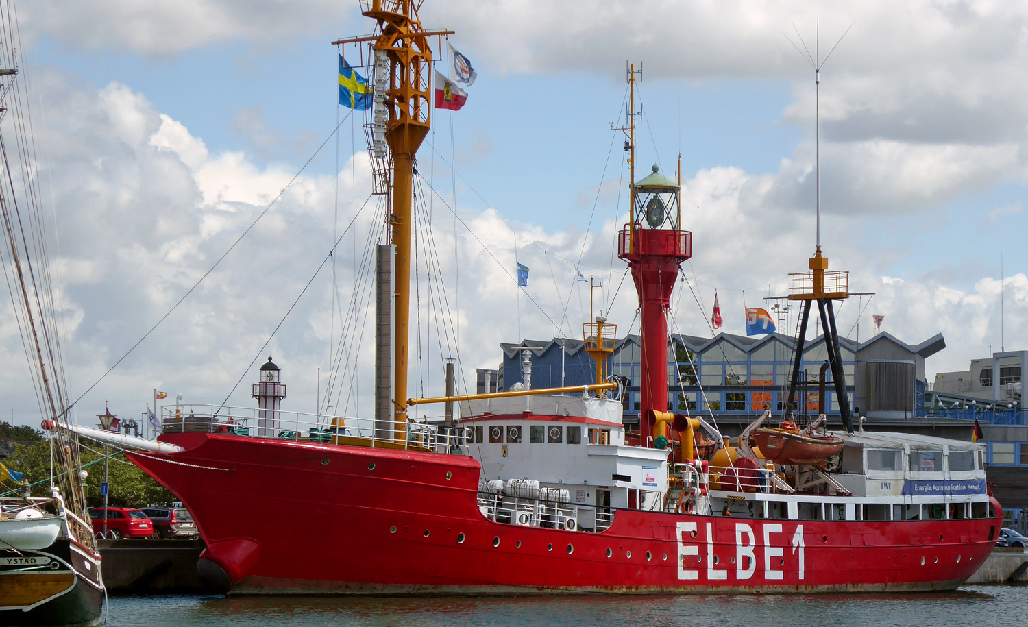 Elbe 1 - Bürgermeister O´Swald II på besök i Ystad 12 juli 2017. Ystads gamla fyr i bakgrunden.